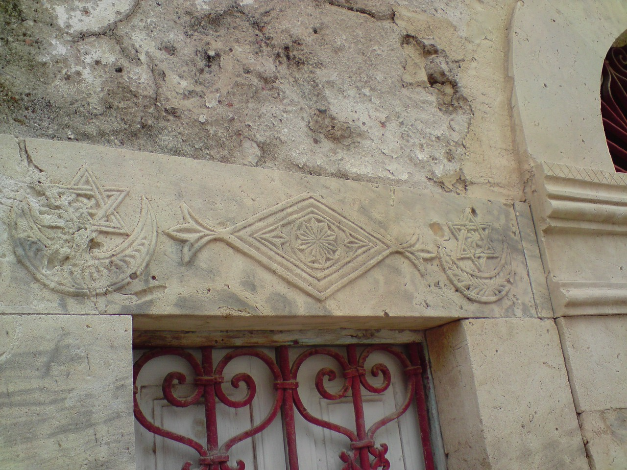 Arabesque à Sayada